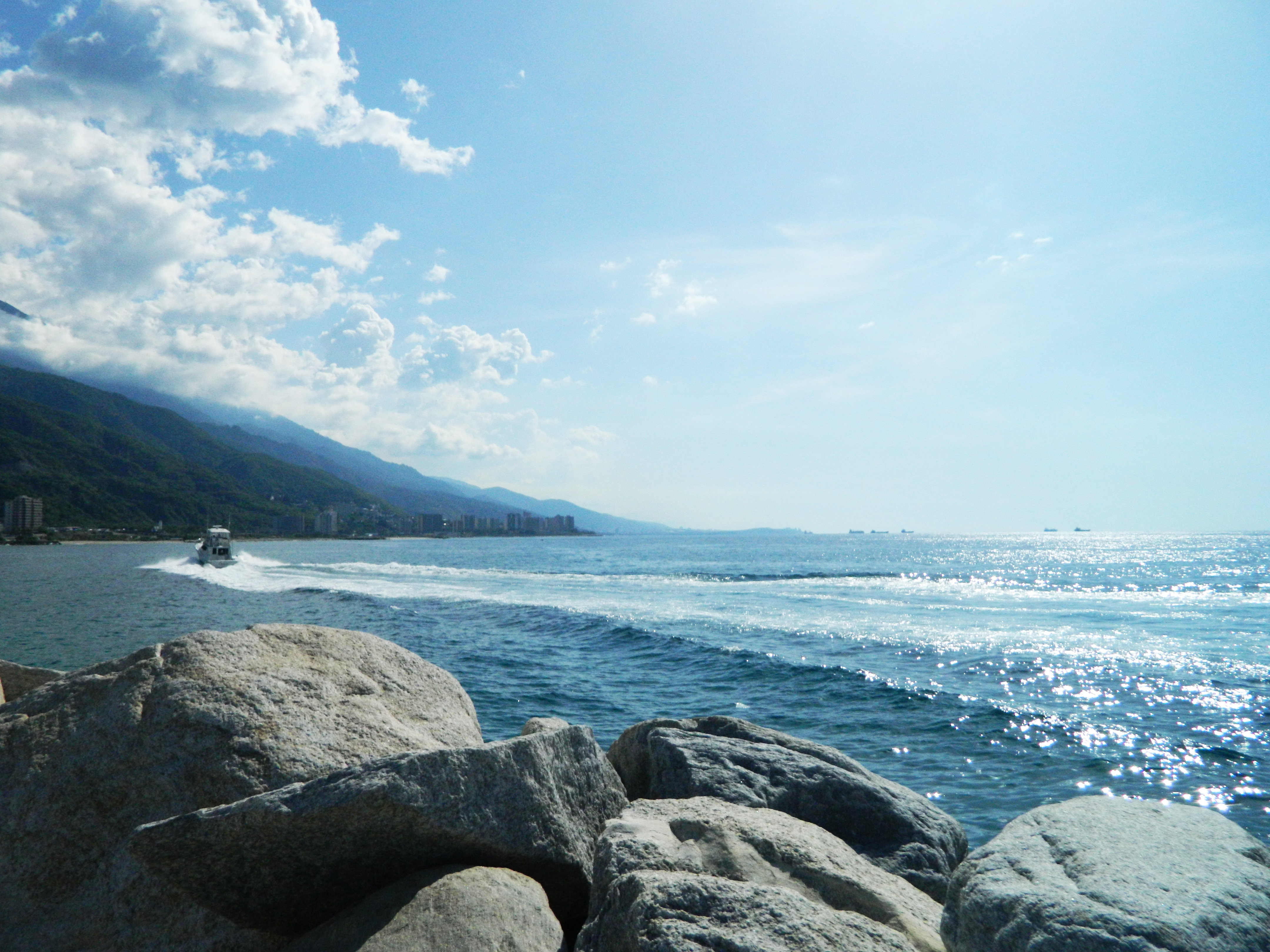 Palyas de La Guaira, Estado Vargas.